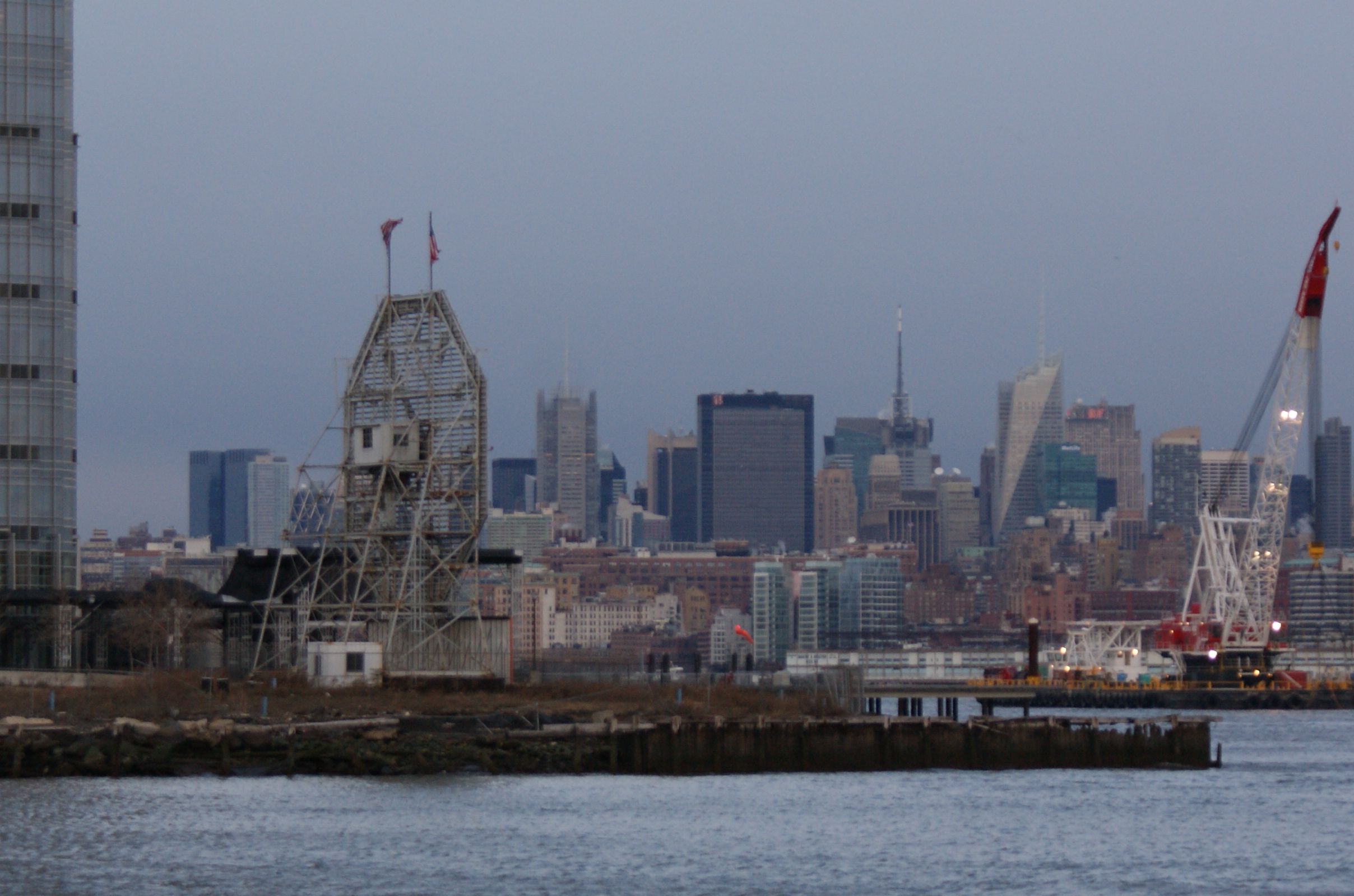 Rückansicht der Colgate Uhr mit Blick auf Süd-West-Manhattan